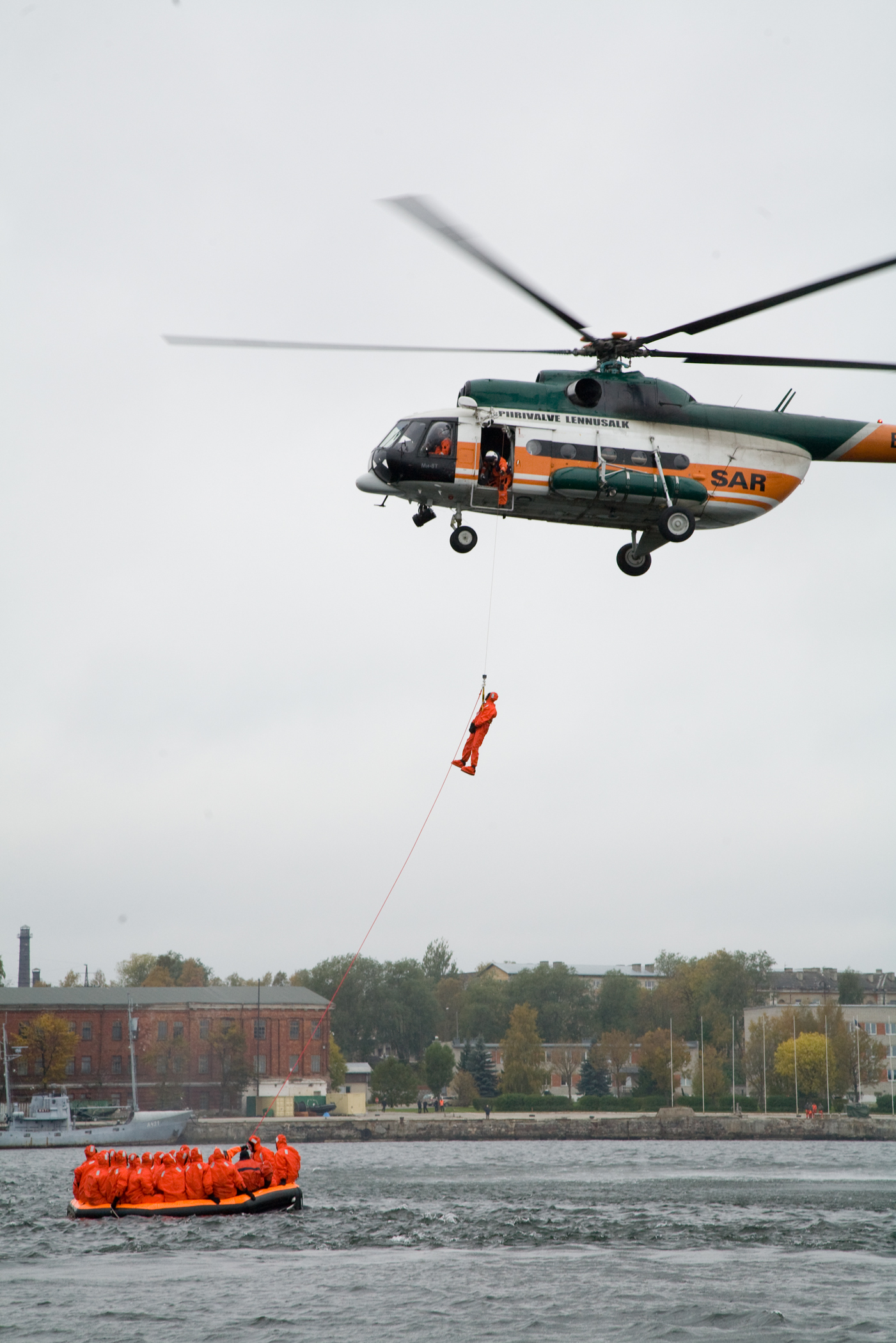 Mi-8 kopterit kasutas Piirivalve Lennusalk kuni 2009. aastani.